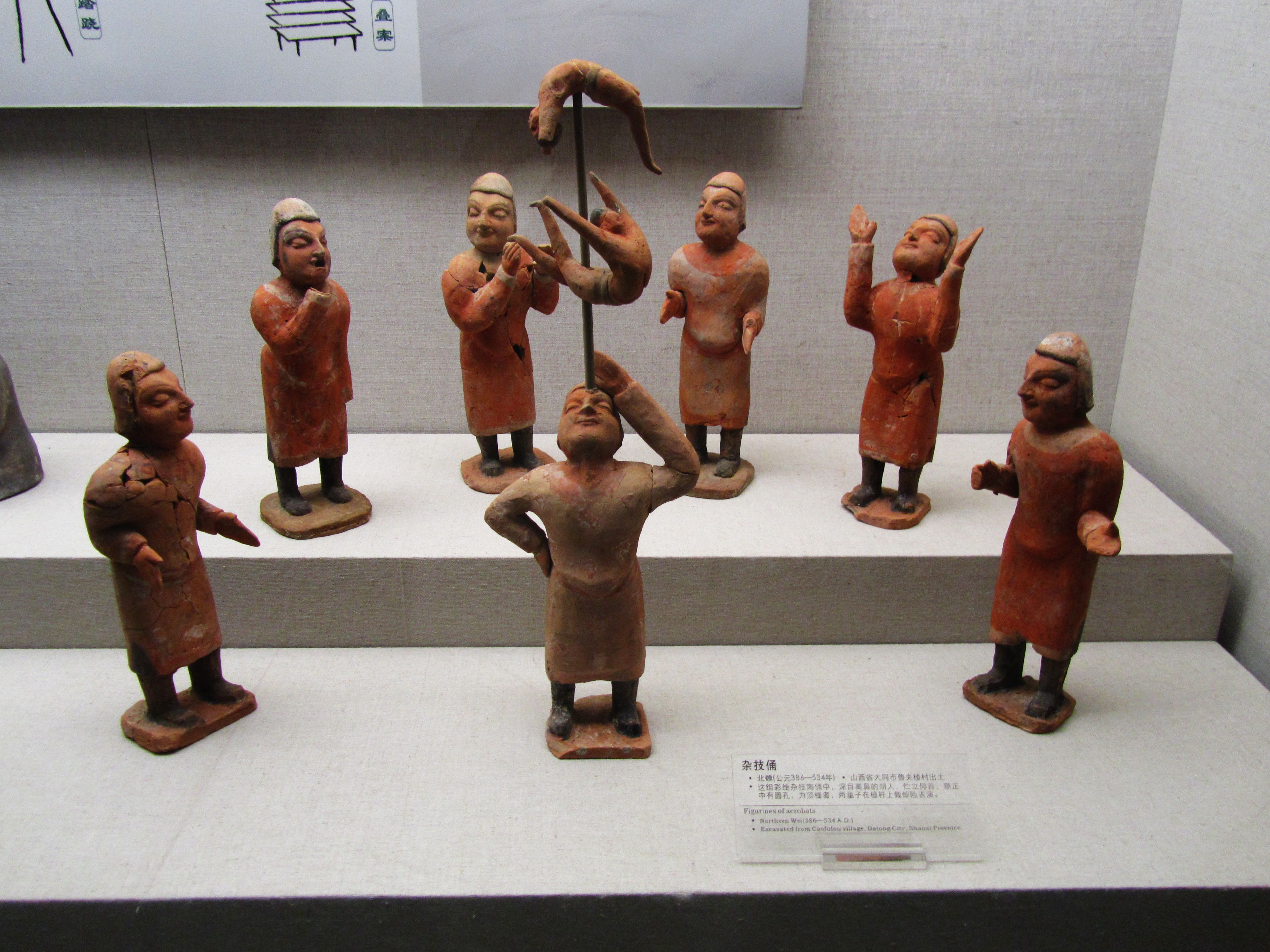 北魏彩绘杂技俑，山西省大同市曹夫楼村出土。